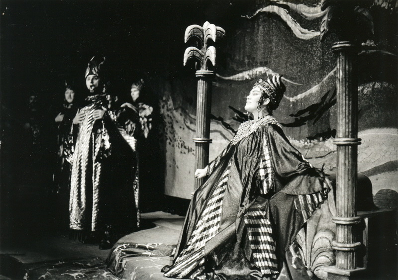 A Nabucco című előadás a Magyar Állami Operaházban.